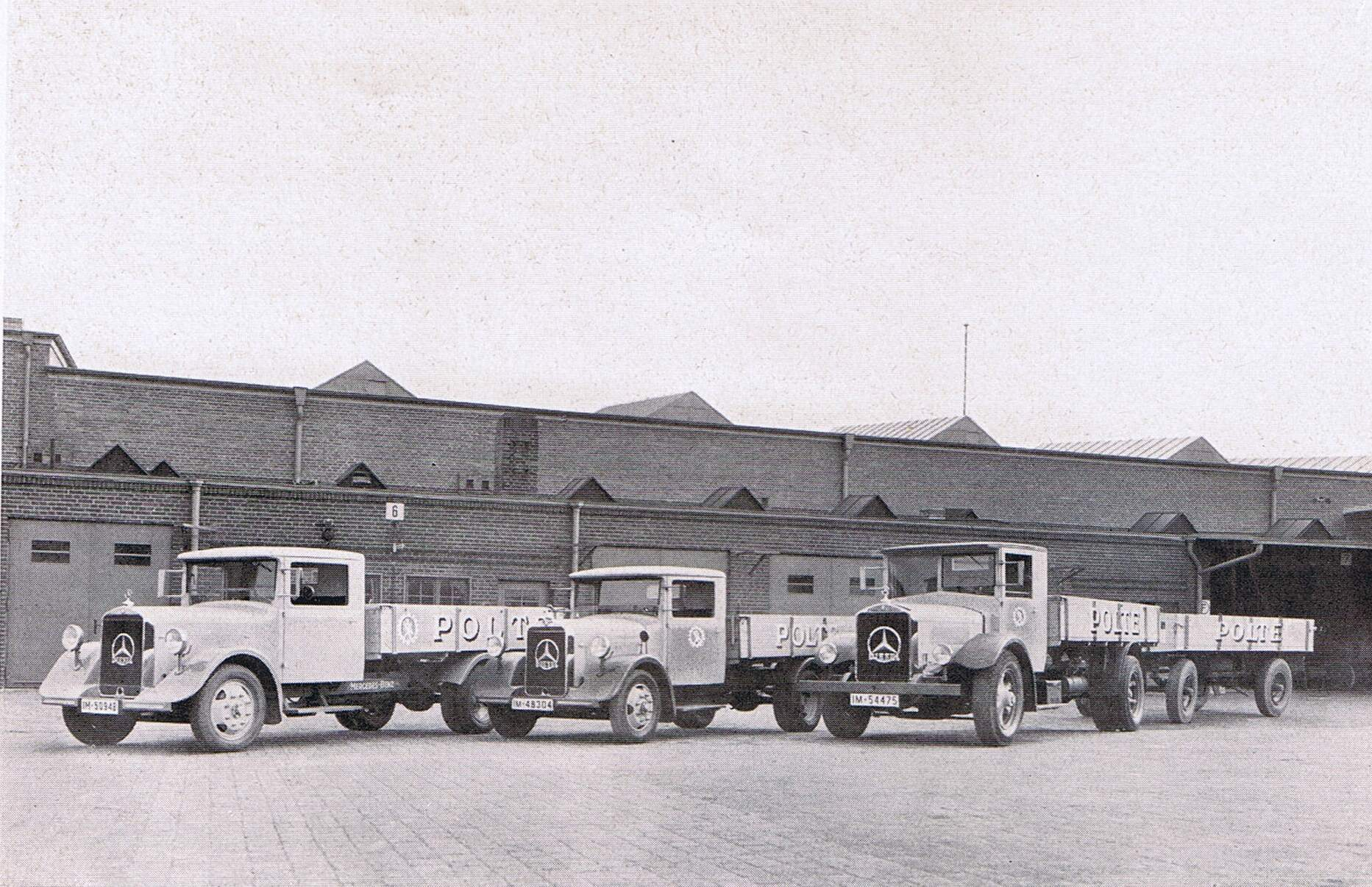 Polte-Werke, LKW-Fuhrpark, Magdeburg